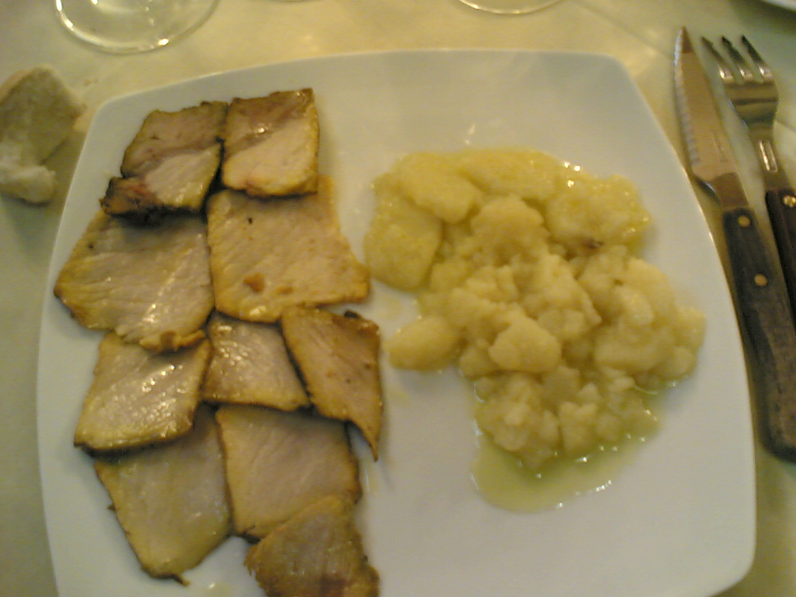 Lomo de Orza. Bajo en calorías (cuando se enfría)